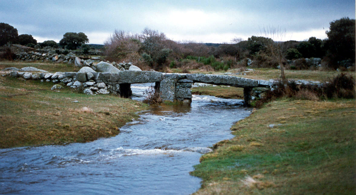 Río Agudín a su paso por la Real Cañada Soriana Occidental